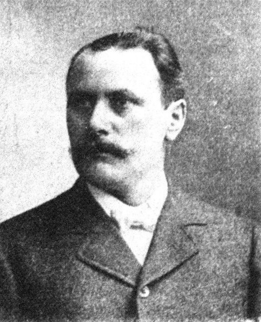 Österreichischer Politiker, Reichsratswahl 1907, Name siehe Dateiname